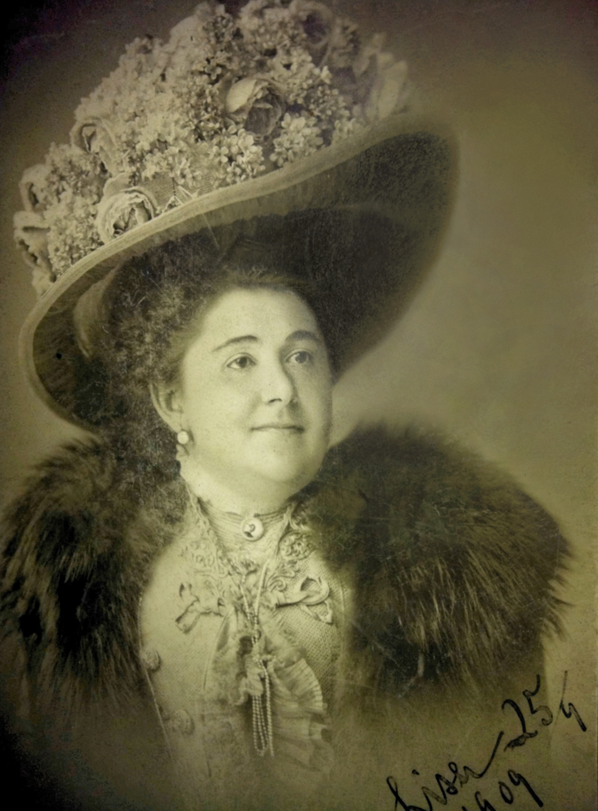 Elisa von Ohanowicz 1909, Gattin des Grafen Georg Wassilko von Serecki